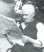 Josef Schmoranz .- český malíř a středoškolský profesor